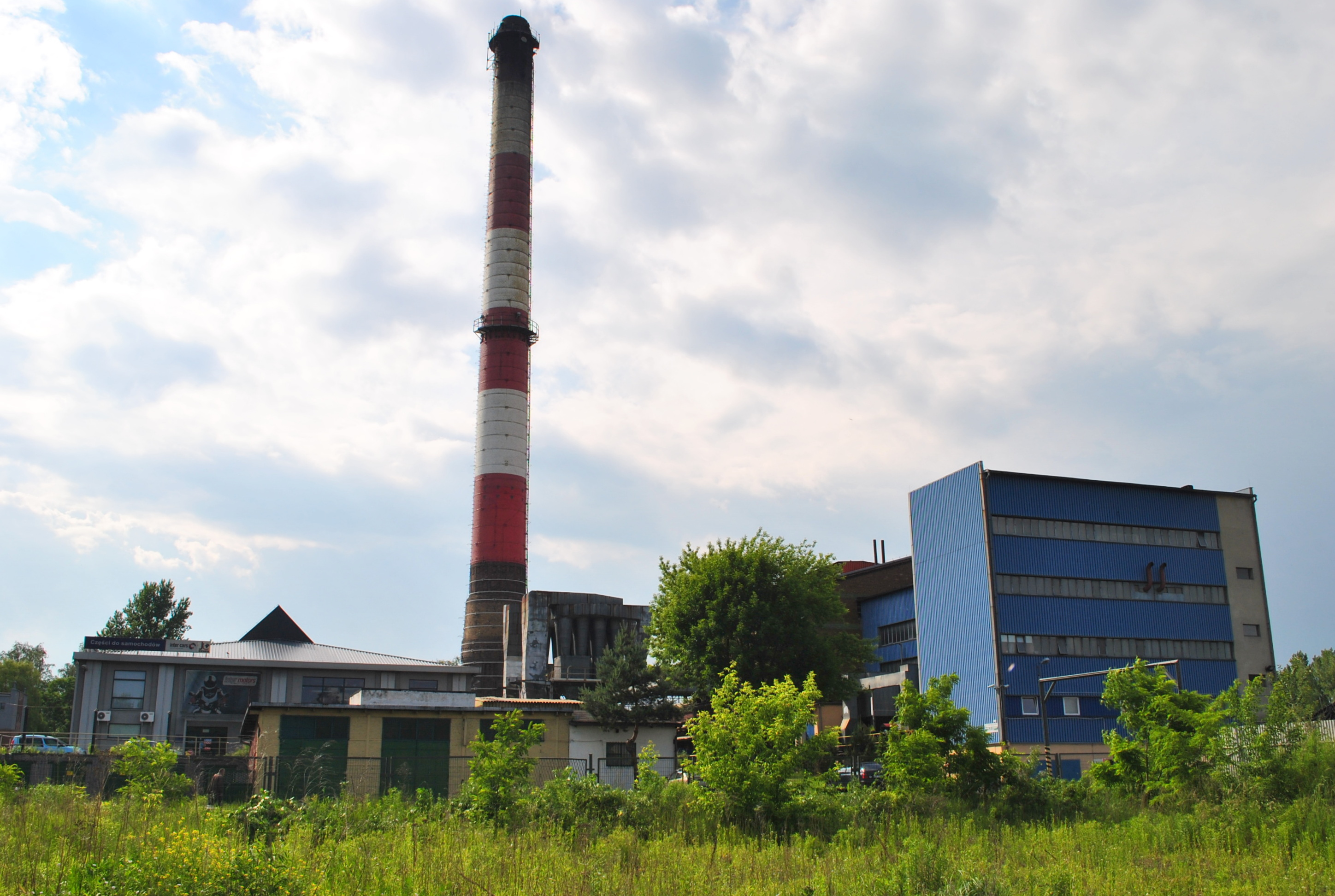 Katowice - Obroki. Ciepłownia ZEC S.A. - wydział VIII Kleofas